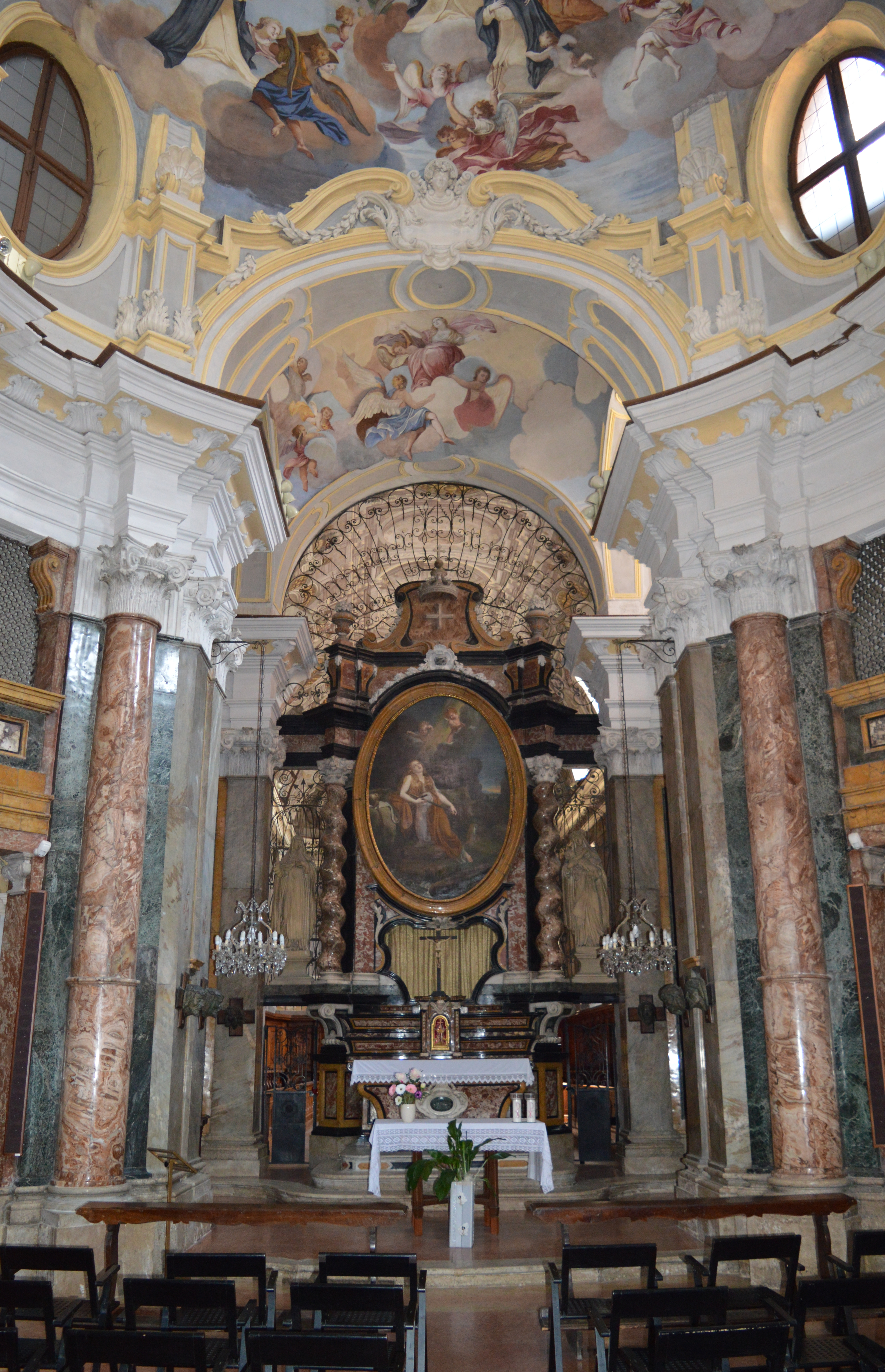 Interno della chiesa della Maddalena ad Alba.